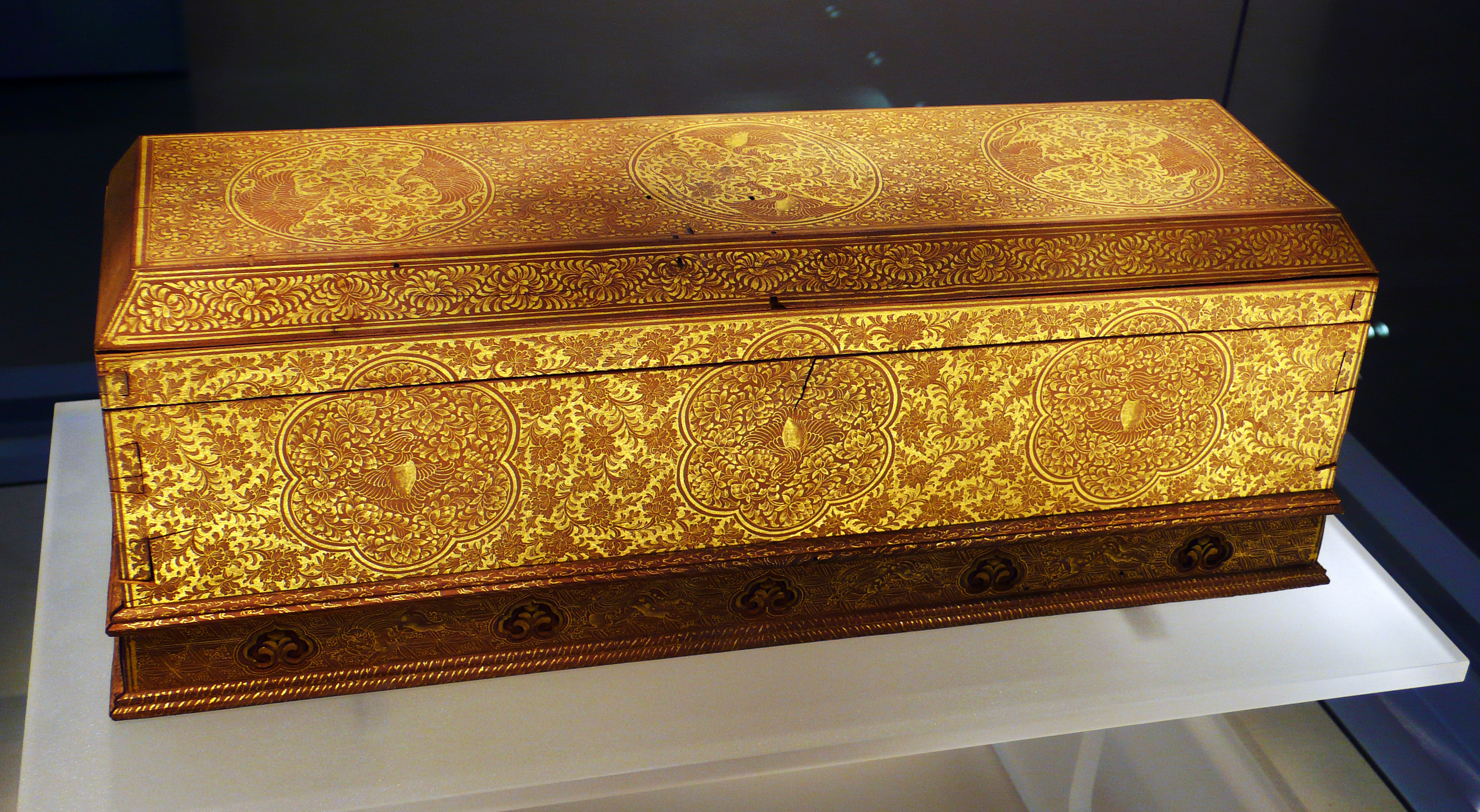 北宋檀木描金经函，温州瑞安仙岩寺慧光塔出土，浙江省博物馆藏。